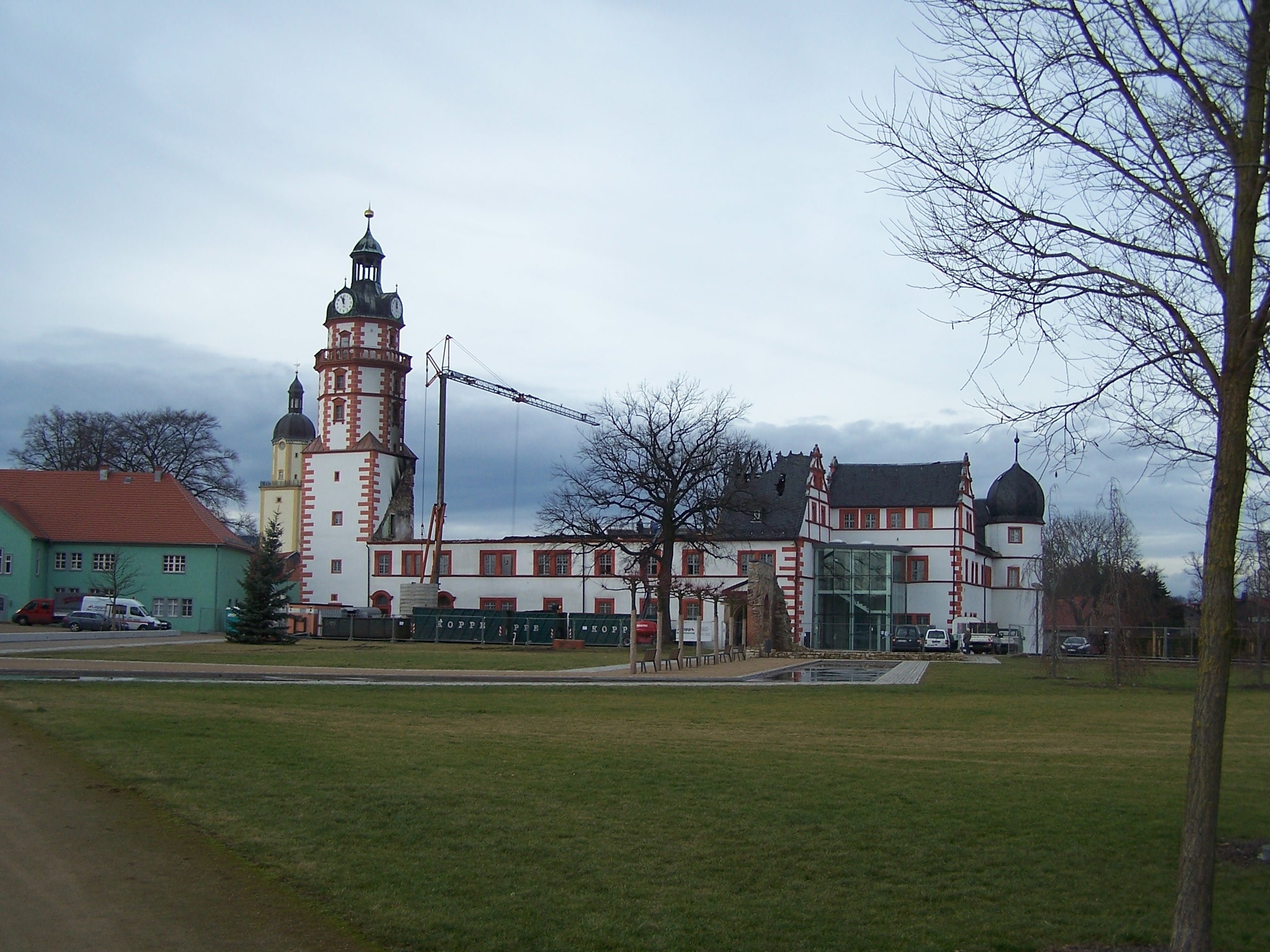 Brandruine Schloss Ehrenstein, Ohrdruf, von Osten.